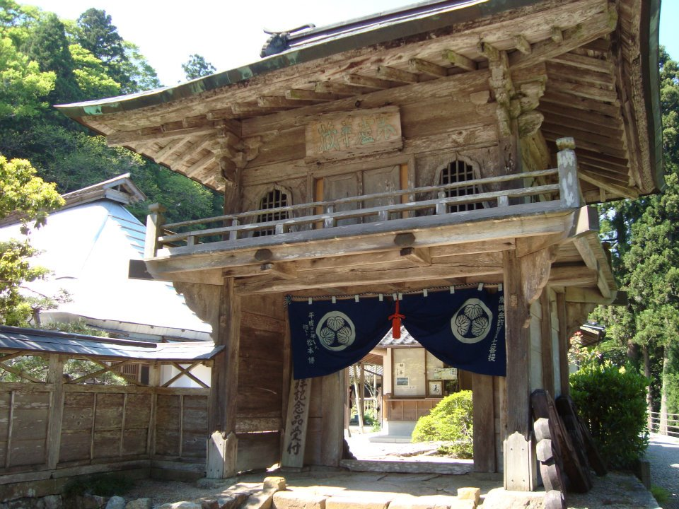 Kezouji Temple on Mount Makuragi in Matsue City - 松江市の華蔵寺（けぞうじ）